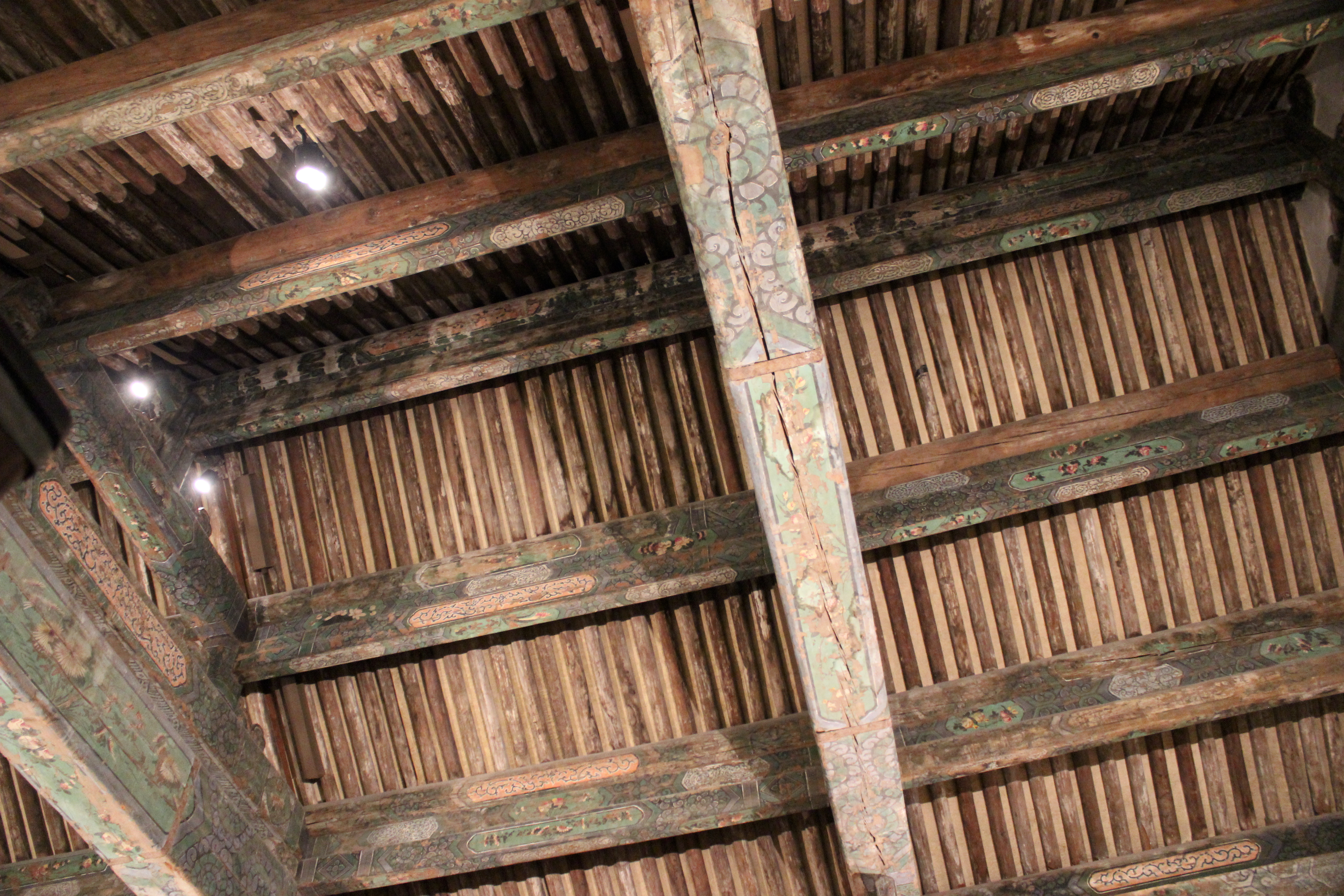 Salón de recepción del palacio del duque Zhao (Zhaogongfu). Philadelphia Museum of Art.